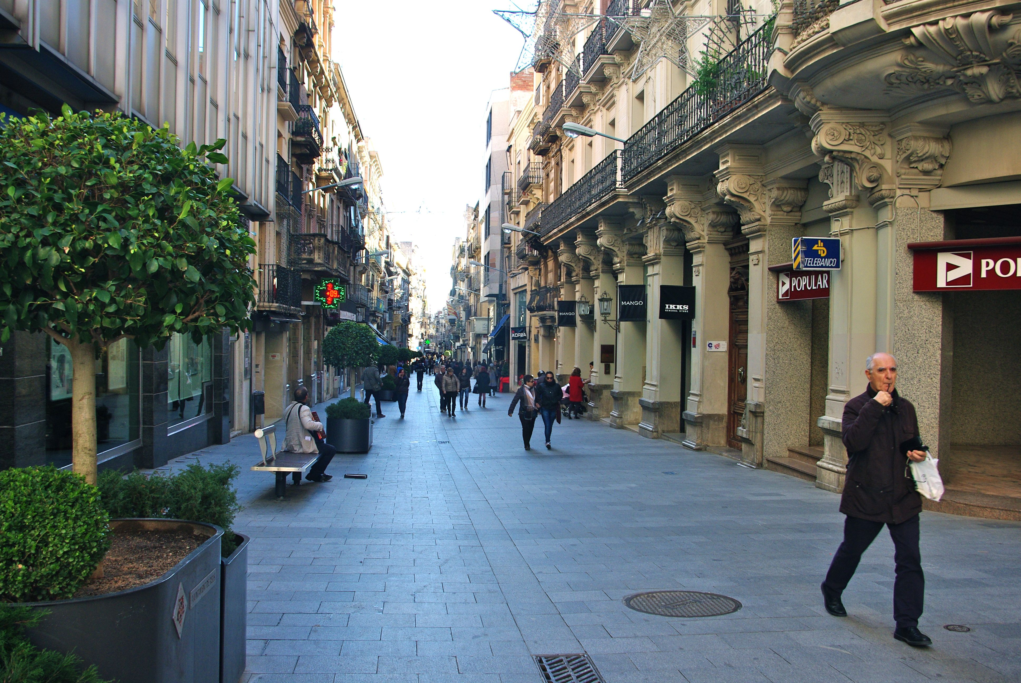 Carrer de Llovera. Al fons, la plaça de Prim, Reus